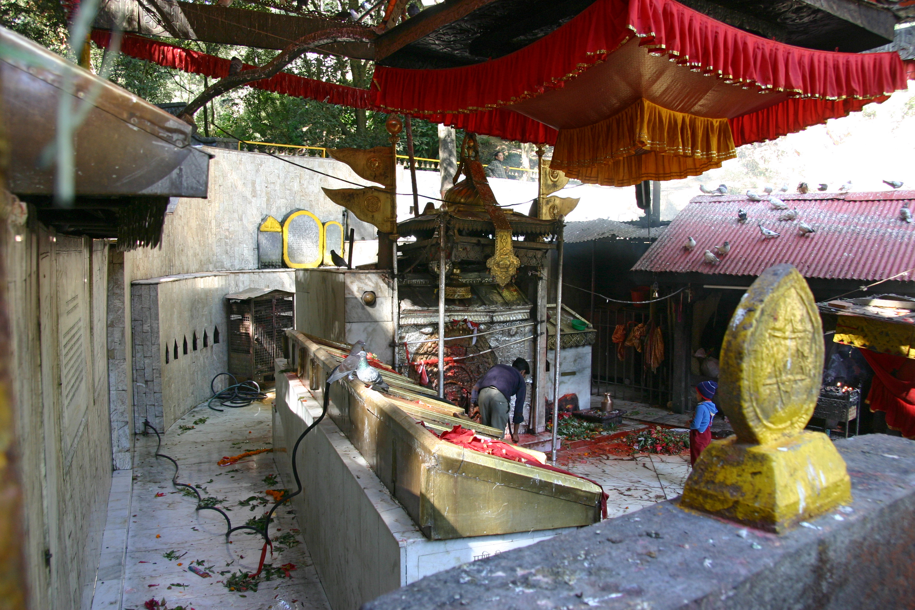 Dakshinkali, Opferschrein.